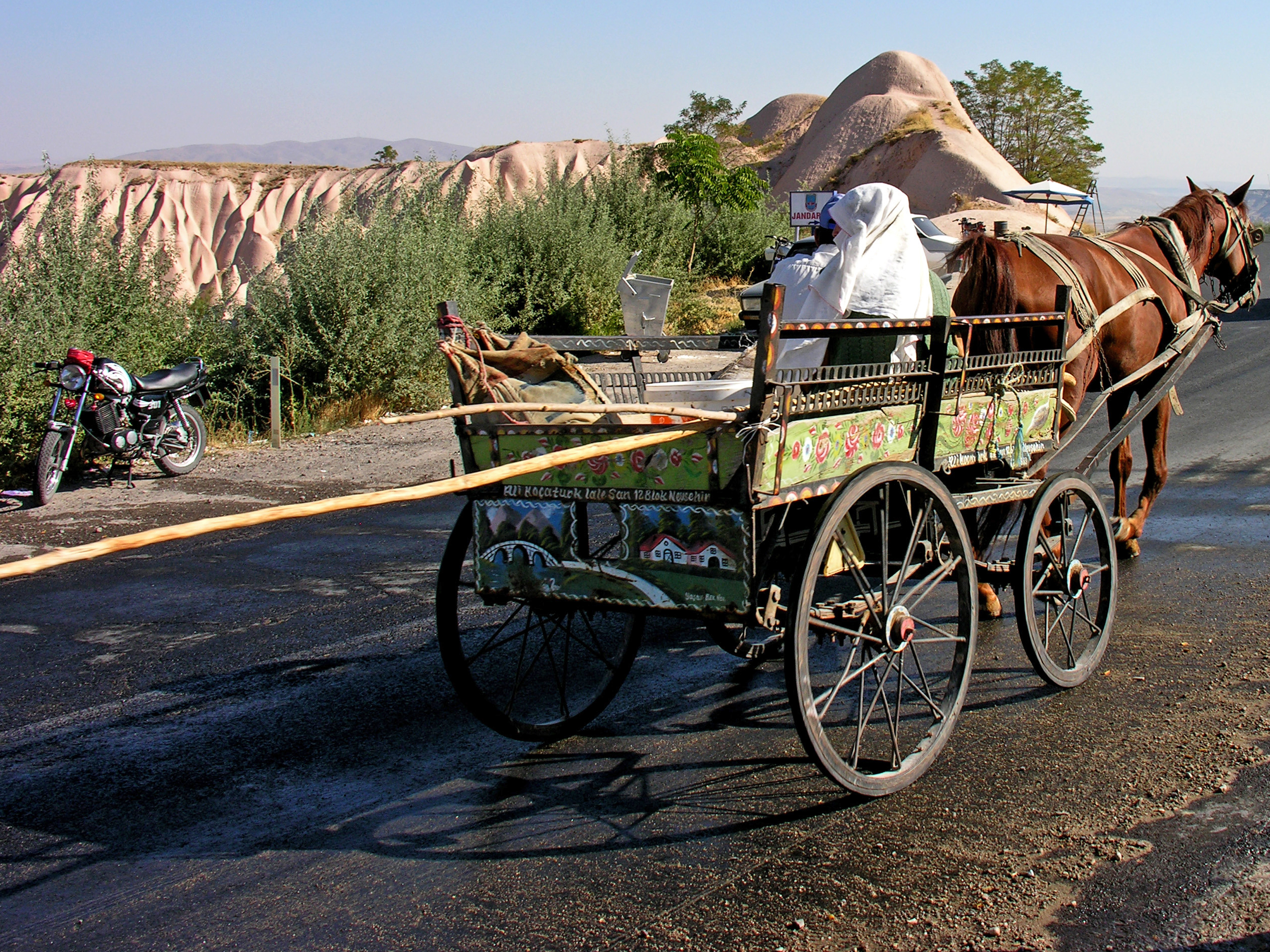 Turkey-1782